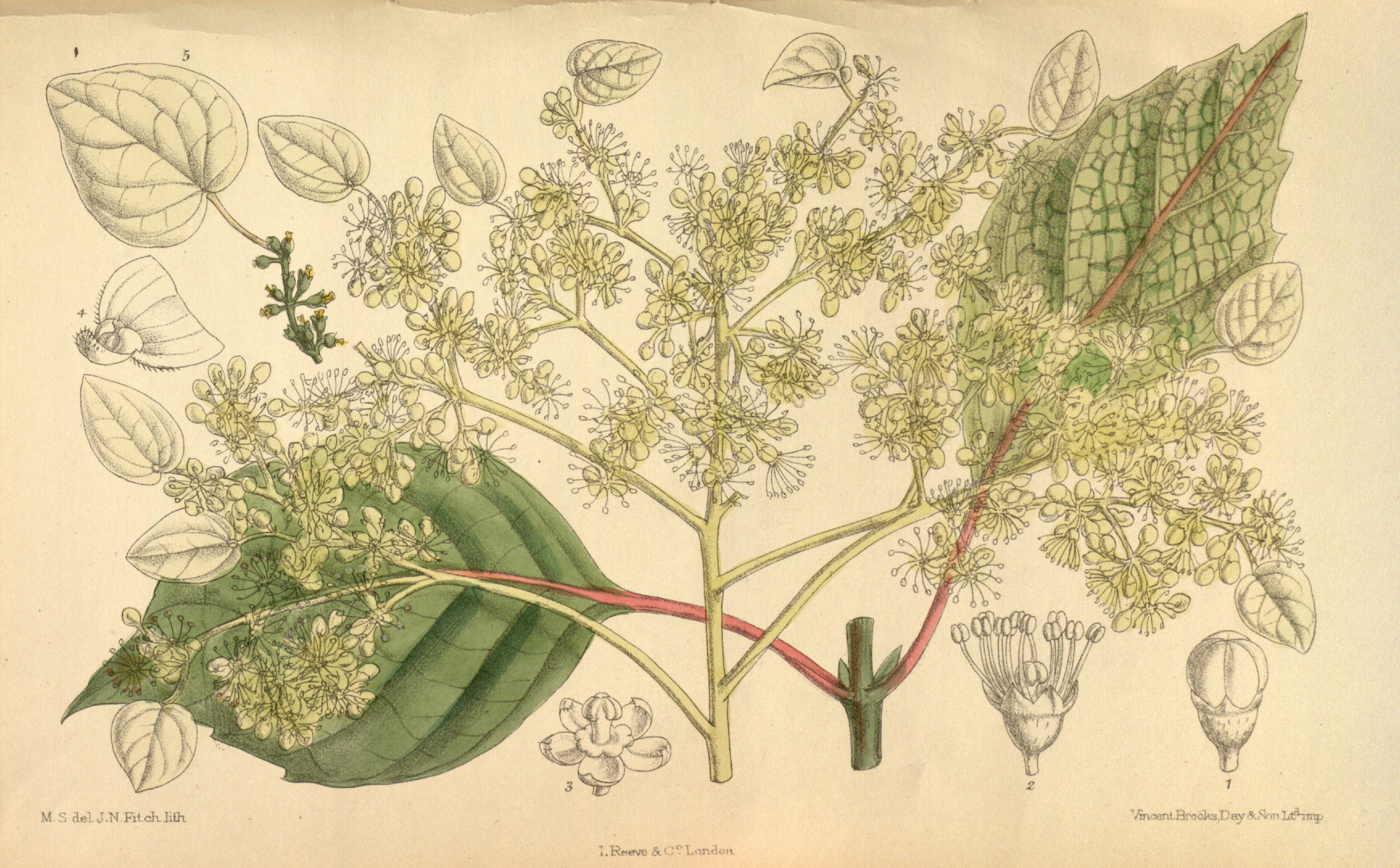 Schizophragma hydrangeoides, Hydrangeaceae